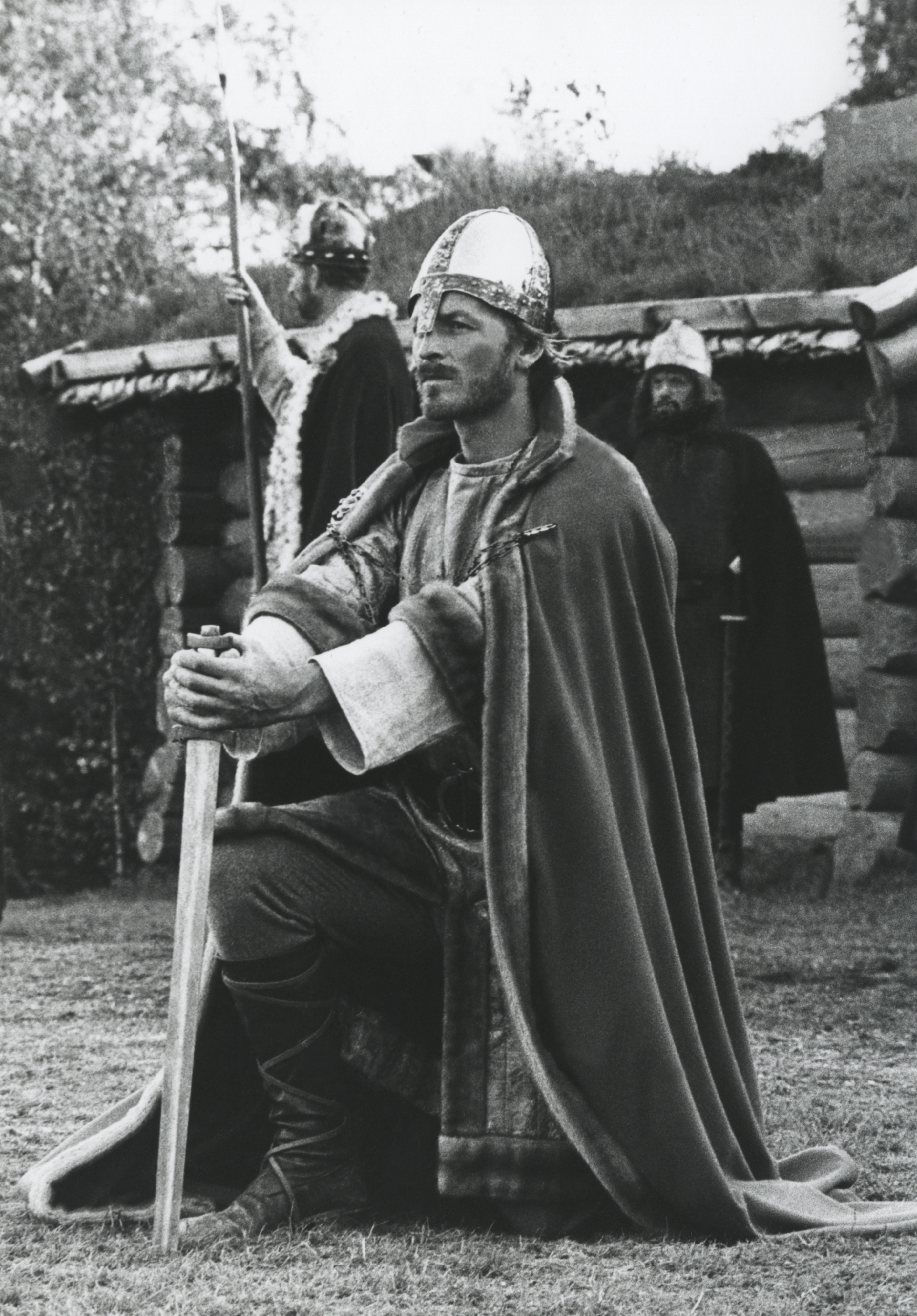 Norwegian actor Erik Hivju as king Olaf II of Norway in the The Saint Olav Drama at Stiklestad 1979.